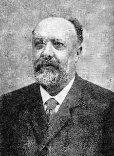 José Ortega Munilla, fotografía en Vida Gallega 1909